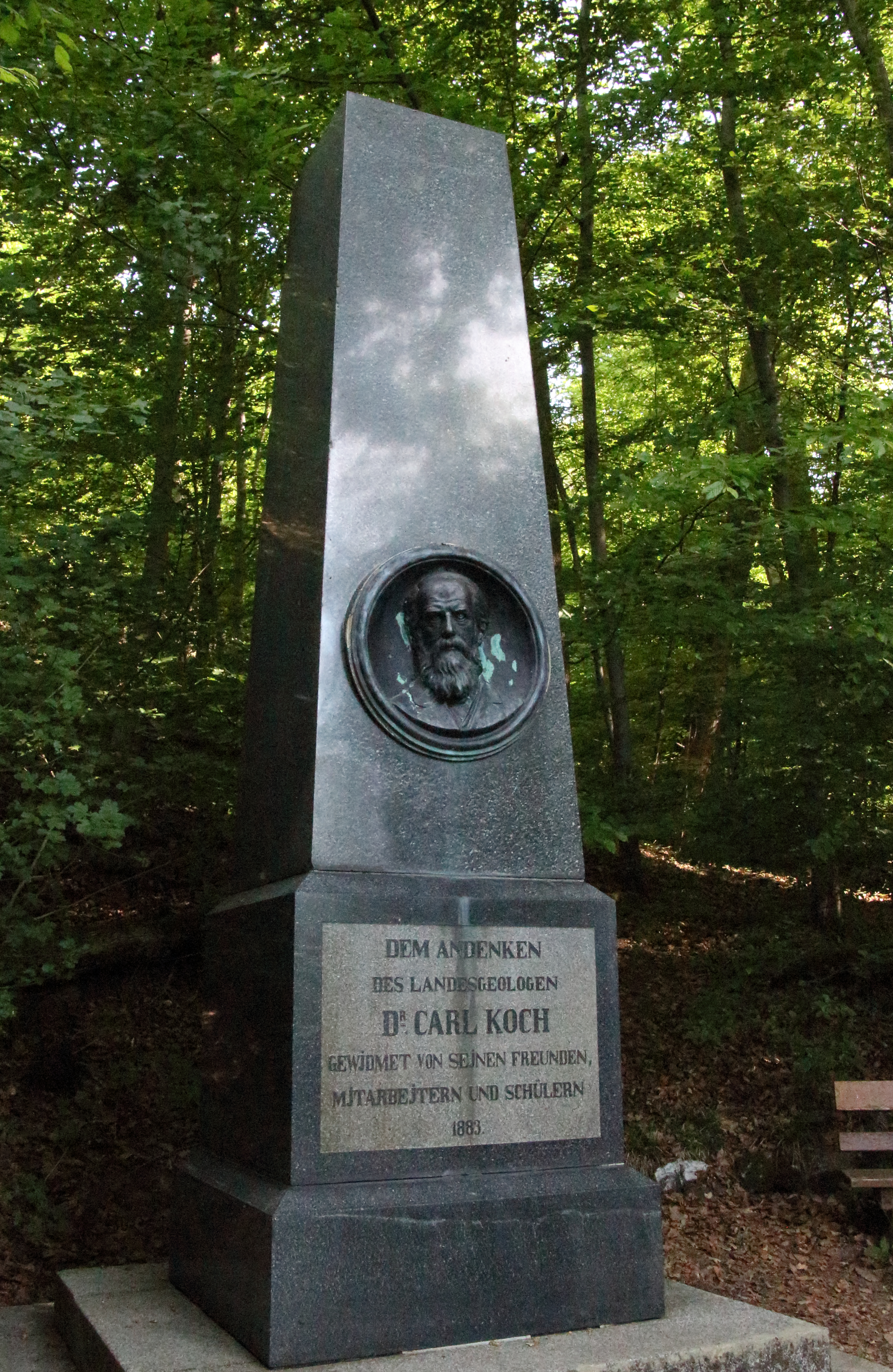 Denkmal für den Naturforscher und Geologen Carl Koch (1827–1882). Gestiftet von Freunden und Schülern 1883, geschaffen vom Bildhauer Hermann Schies.